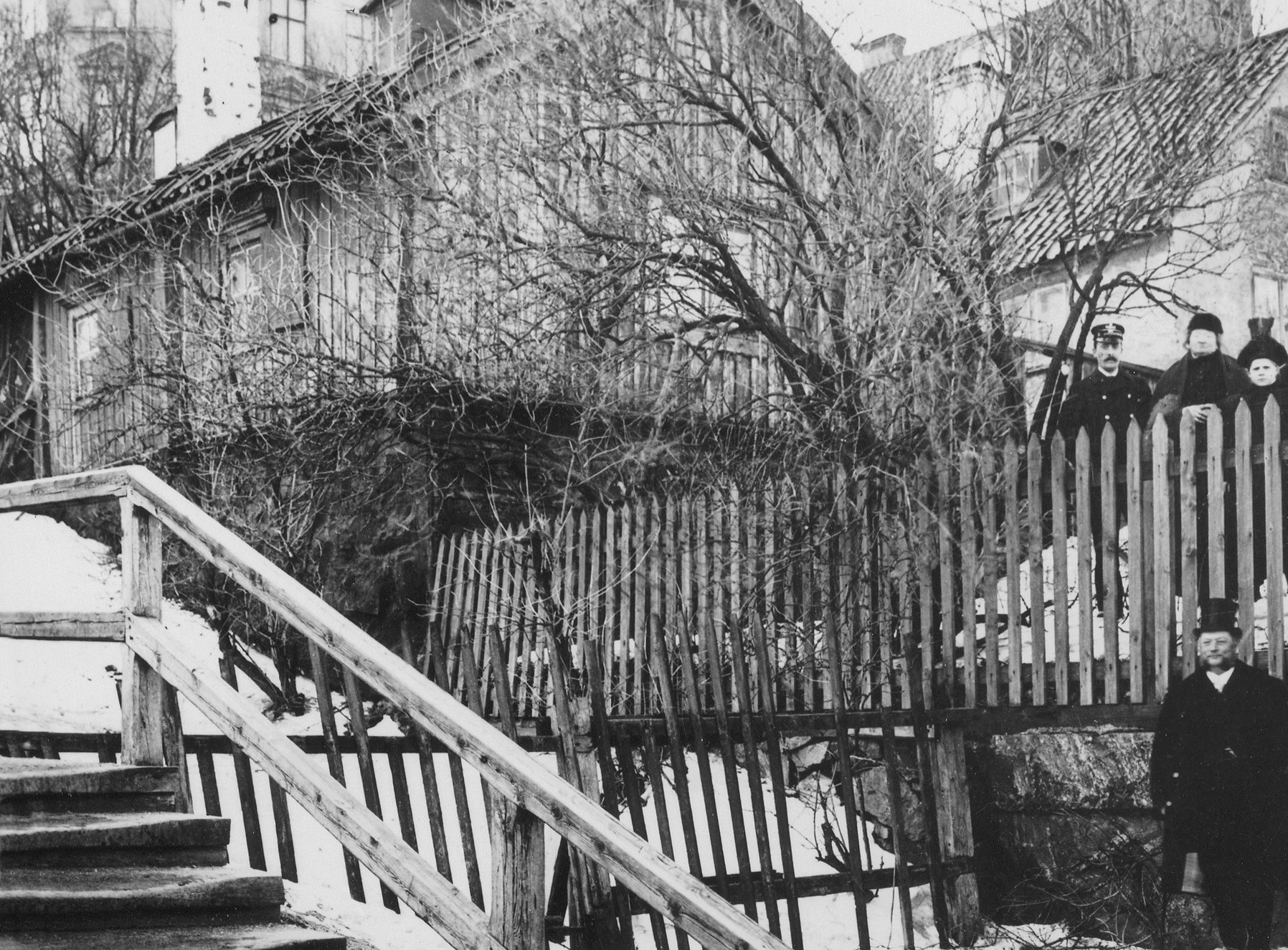 Gamla Söderbergs trappor